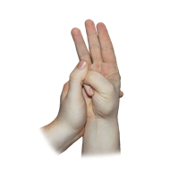 Варуна Мудра (Мудра Воды)